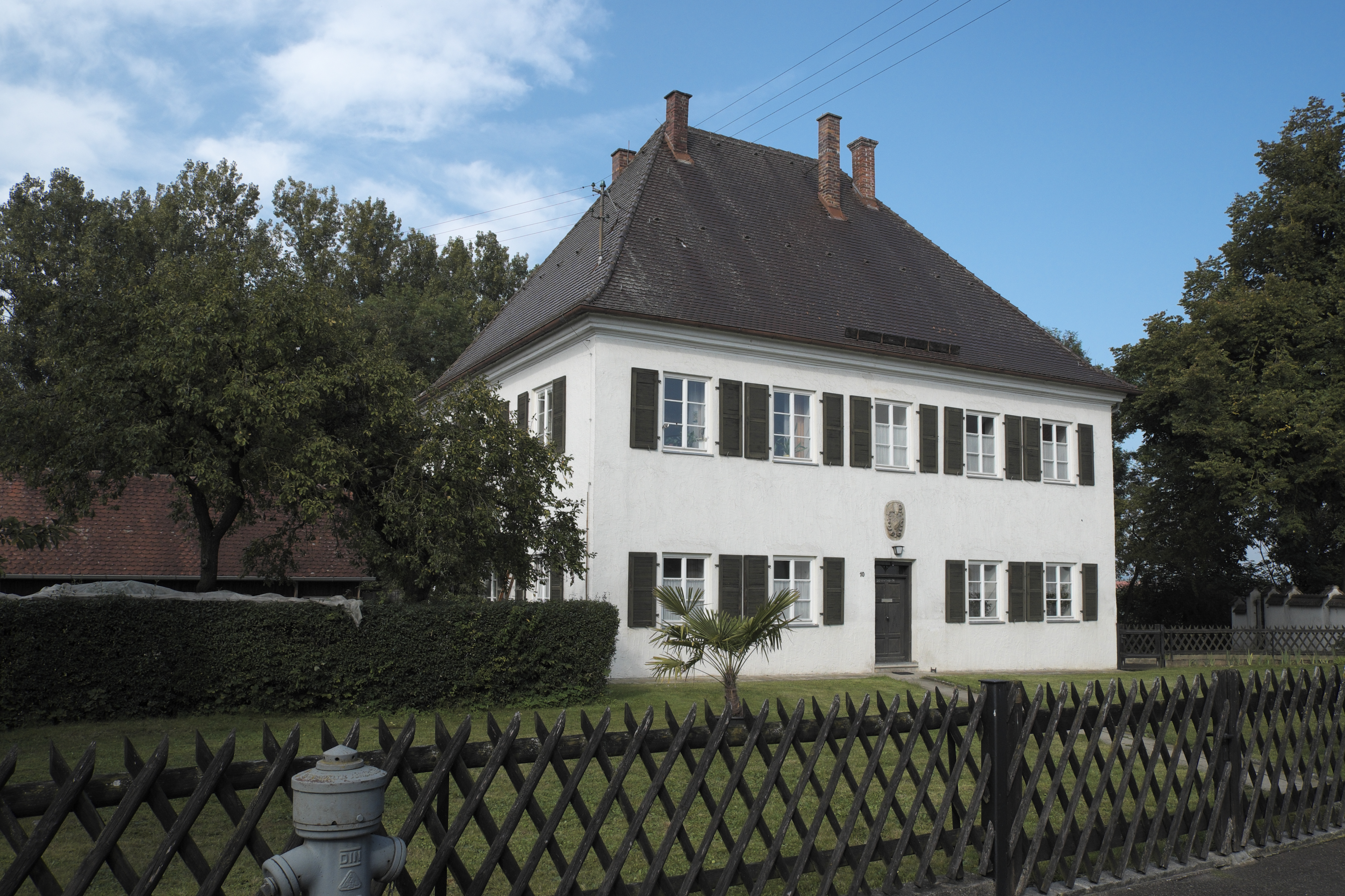 Pfarrhaus in Ziertheim (Landkreis Dillingen an der Donau/Bayern)